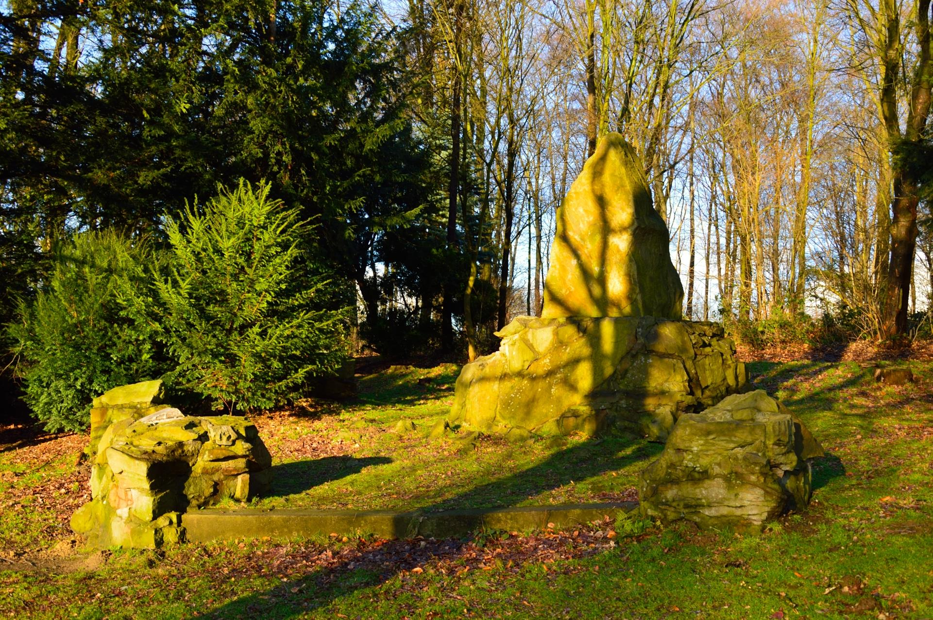 Republikanerdenkmal in Witten. Die Bronzereliefe der Politiker Friedrich Ebert, Matthias Erzberger und Walther Rathenau sind geplündert.